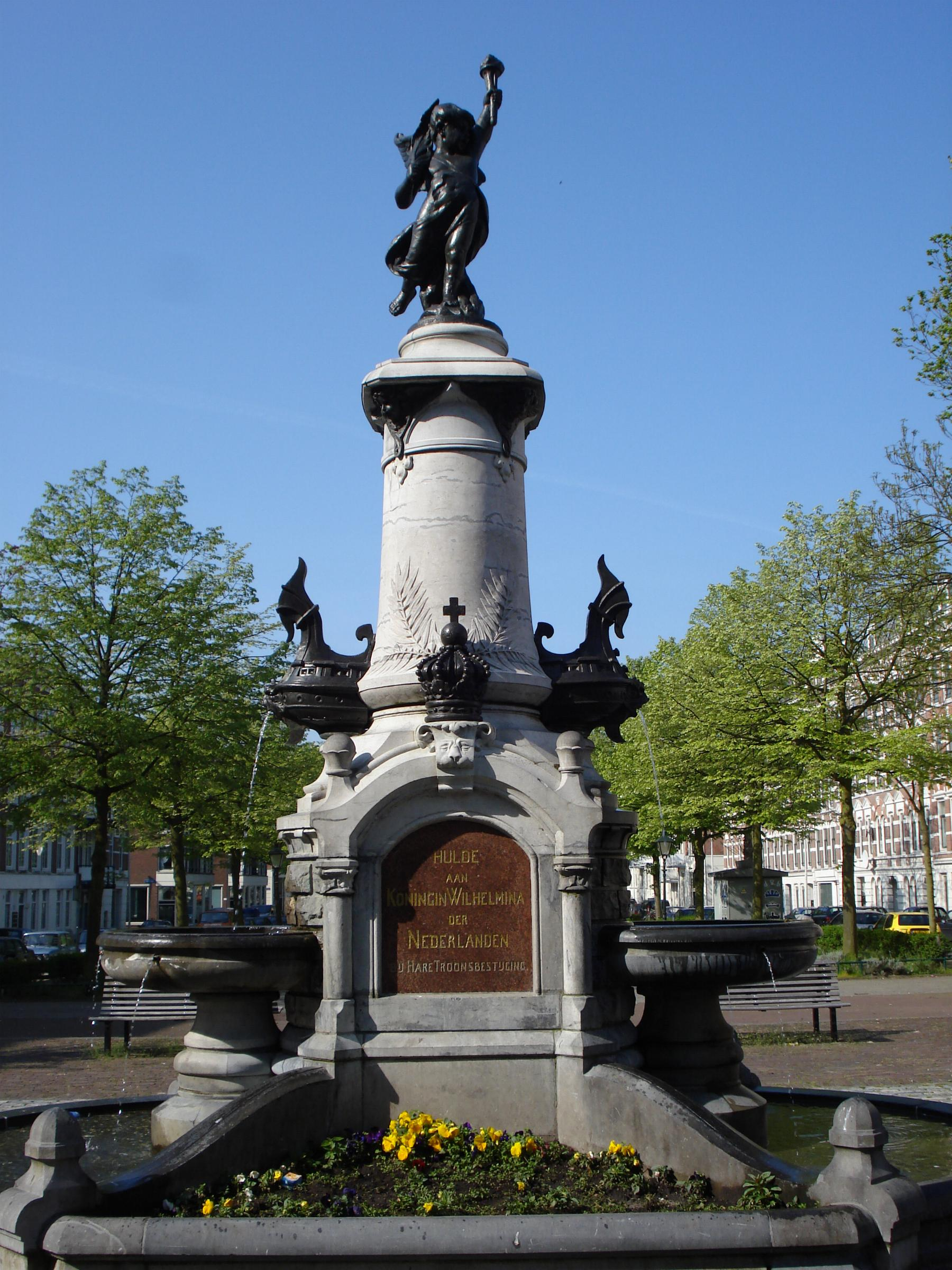 Rotterdam, Noordereiland. Monument voor Wilhelmina. Rijksmonument.